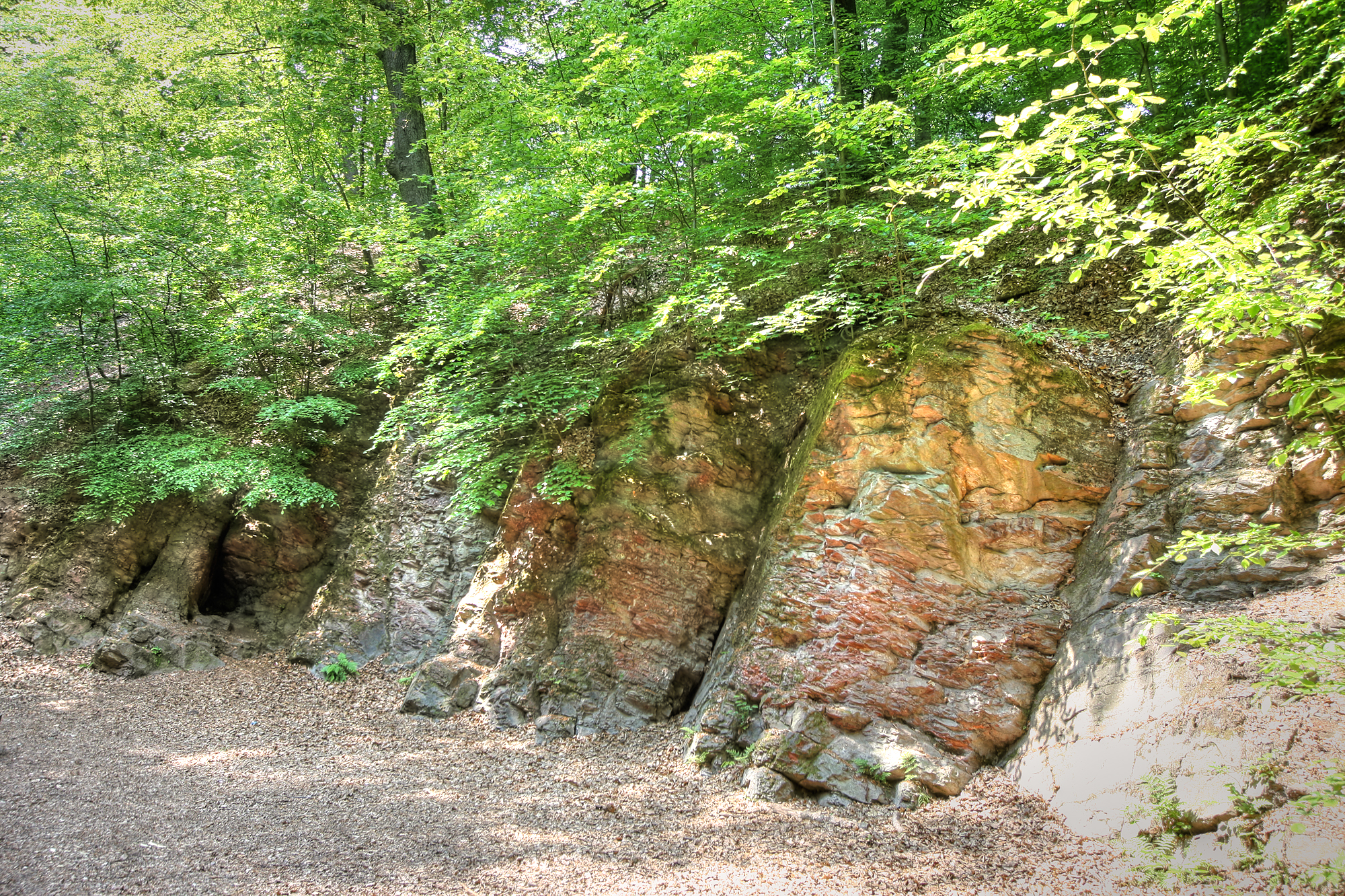 Brennender Berg nahe Dudweiler/Sulzbach, Felsöffnungen mit spürbarem Wärmeaustritt